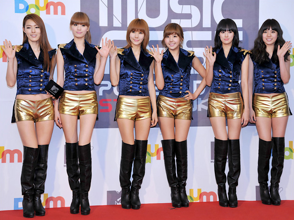 애프터스쿨. 2011년 2월, MTV-DAUM 뮤직 페스트에서.